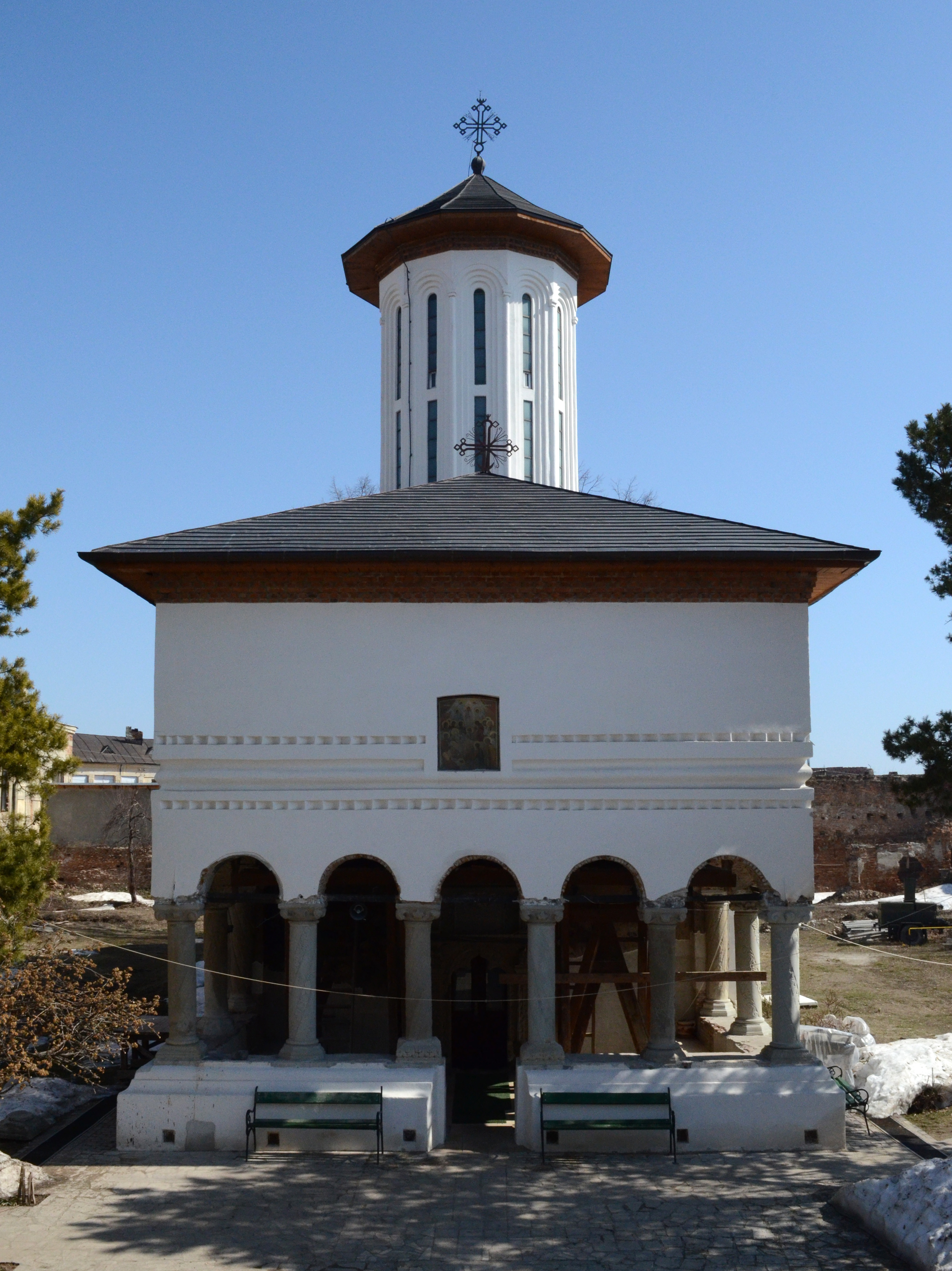 Biserica "Adormirea Maicii Domnului", Râmnicu Sărat 01